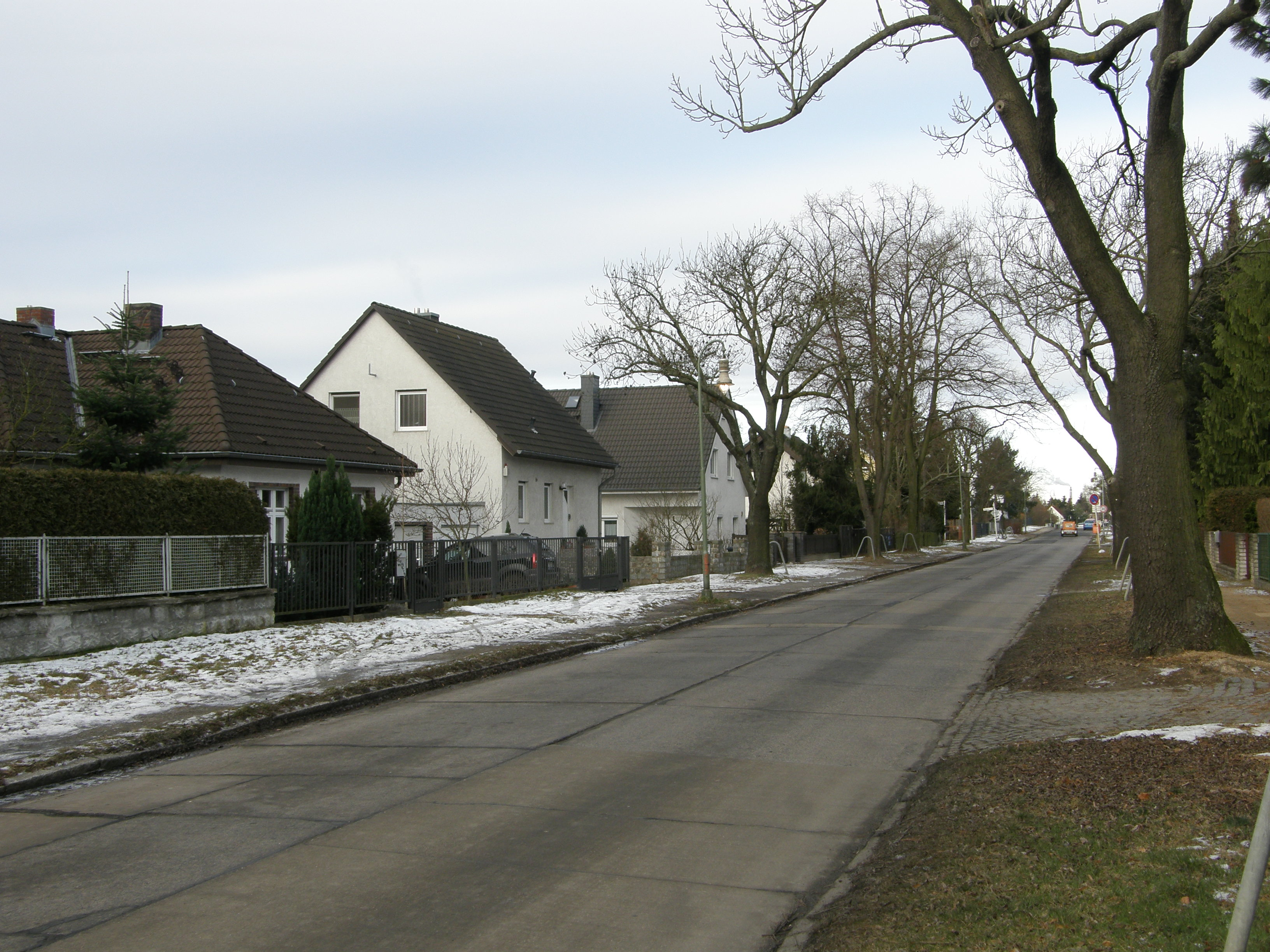 Berlin-Mahlsdorf, Wilhelmsmühlenweg